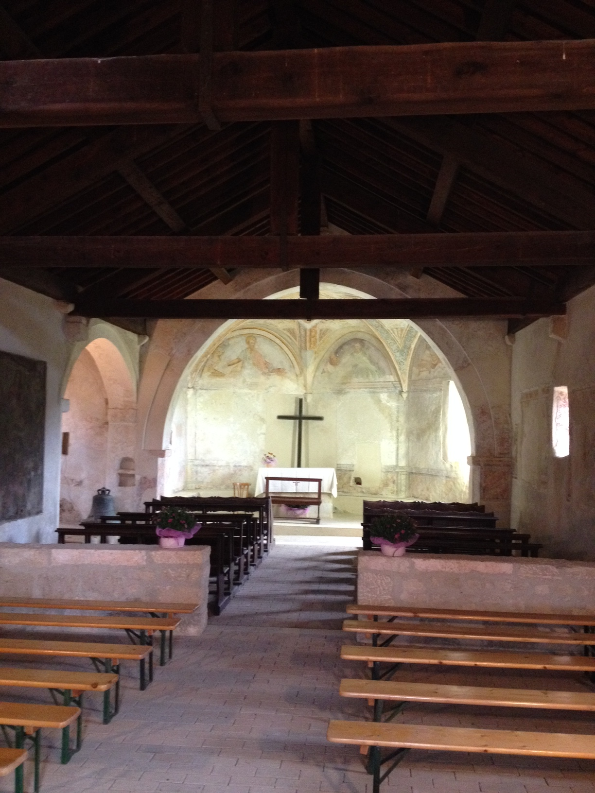 Chiesa di San Lorenzino, Orco (SV) Italy